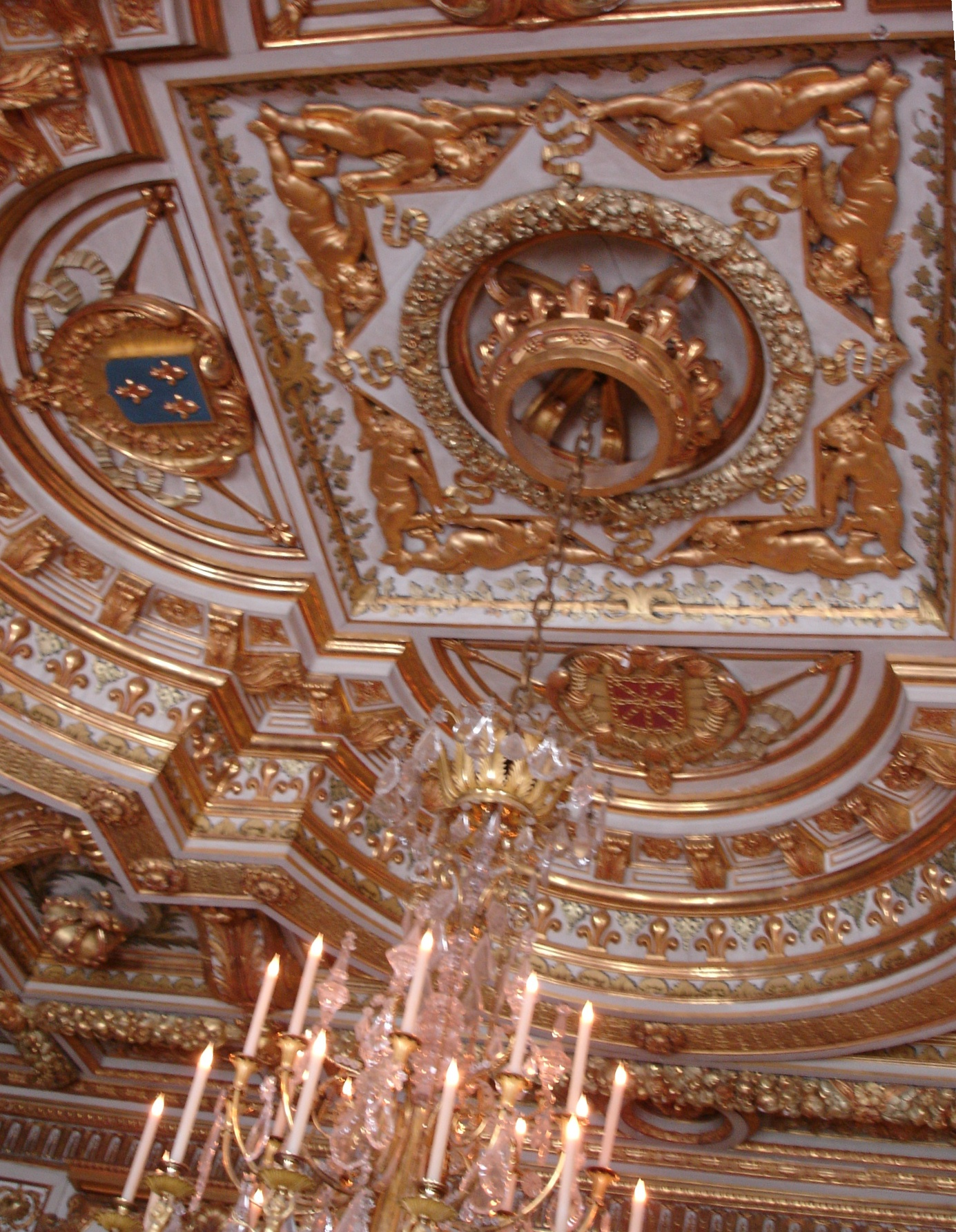 Decke im Thronsaal des Schlosses Fontainebleau